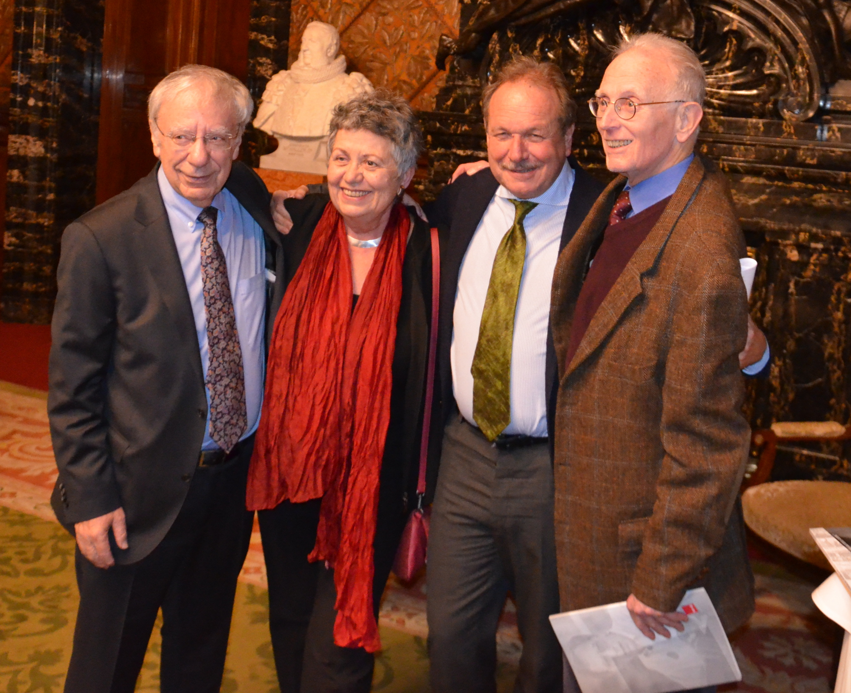 Senatsempfang für Roland Issen am 08. Januar 2018 in Hamburg (Rathaus Hamburg, Bürgermeistersaal). Treffen dreier Gründungsmitglieder mit dem ver.di Vorsitzenden Bsirske.